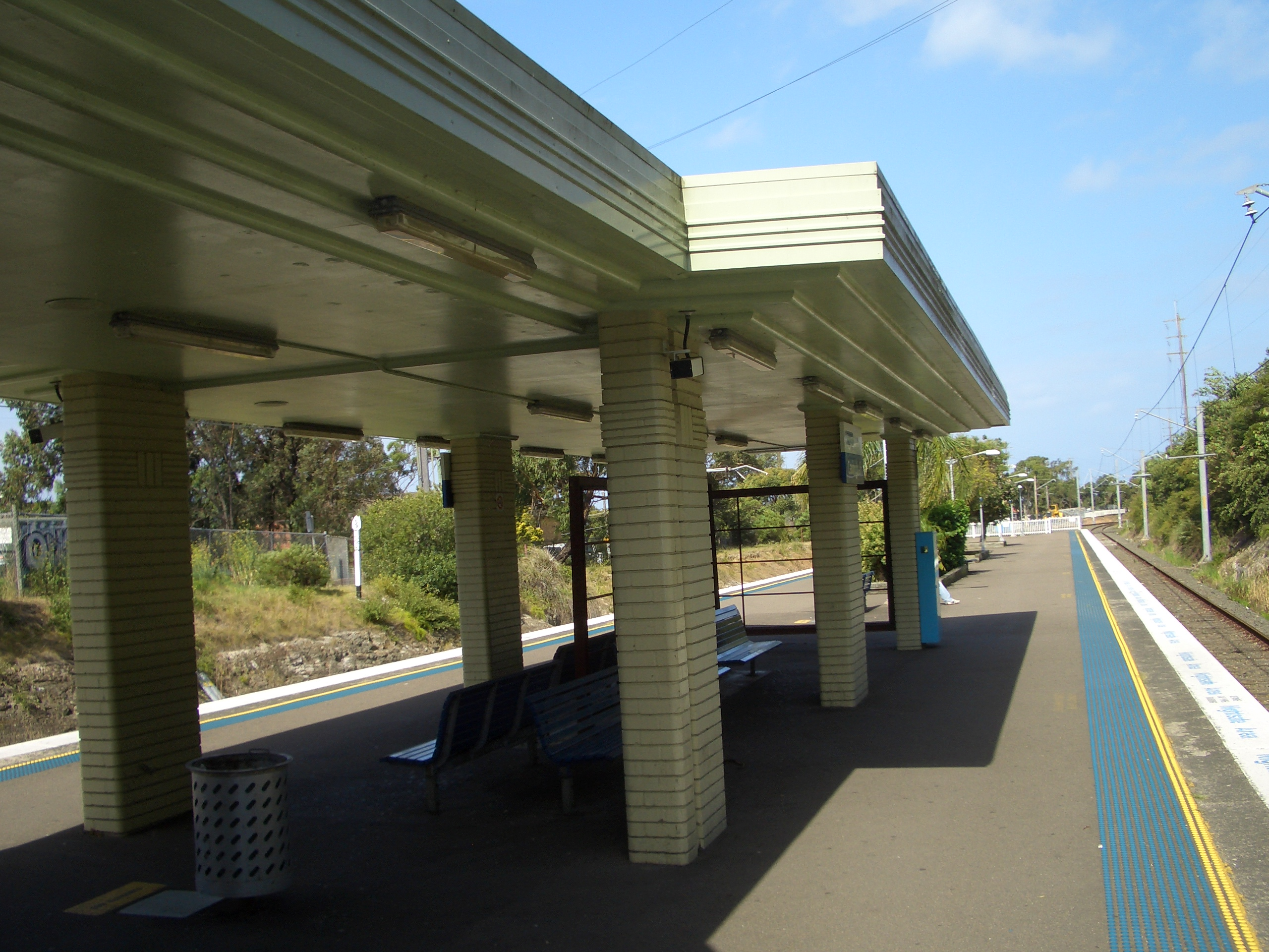 Caringbah_Railway Station